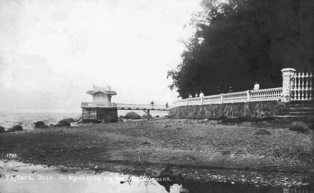 Kotsenevi lossi ujumissild Utrias oja suudmes